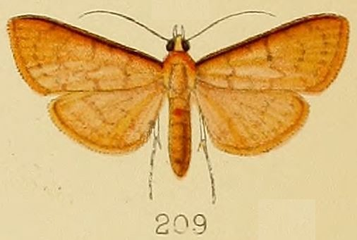 Psara bractealis (Kenrick, 1907)